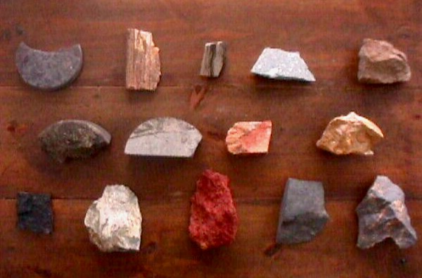 Colección de rocas Fila superior 1 Roca sedimentaria: lutita 2 Xilopalo: Madera petrificada 3 Roca sedimentaria: lutita con laminaciones 4 Roca ignea: Granito 5 Roca sedimentaria: arenisca cuarzosa Fila central 1 Roca sedimentaria: arenisca con impregnaciones de hudrocarguros y azufe 2 Roca sedimentaria: limolita fosilifera 3 Rocasedimentaria: roca caliza 4 Roca sedimentaria: arenisca Fila Inferior 1 Mineral carbón 2 Roca metamorfica: esquisto micaceo 3 Roca sedimentaria: suelo lateritico de hierro 4 Roca metamorfica: esquisto paleozoico 5 Roca sedimentaria: caliza fosilifera con vetas de calcita